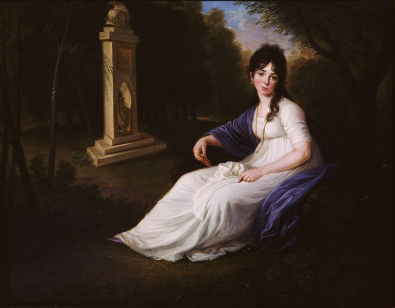 Вдова. Возможно на портрете изображена Екатерина Александровна Муромцова, ур. Волкова (1766—1813), вдова М. В. Муромцова (1734—1799).